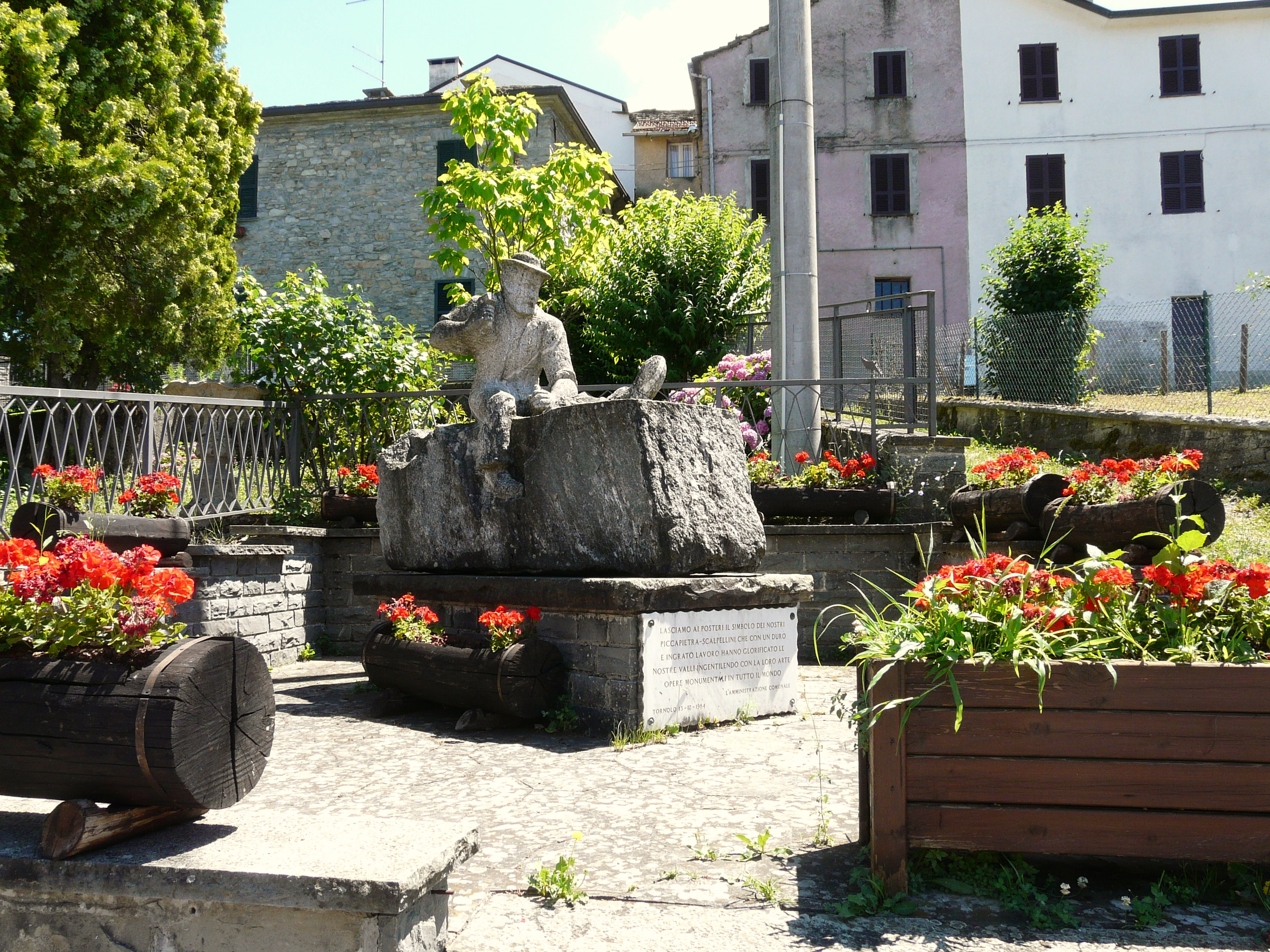 Monumento ai scalpellini-piccapietra di Tornolo, Emilia Romagna, Italia